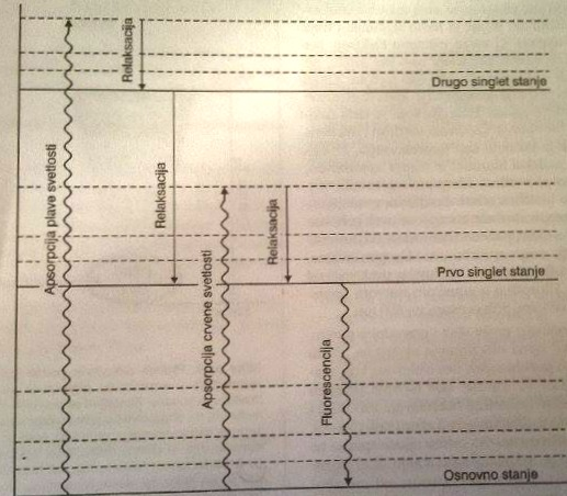 Paralelne linije predstavljaju vibracione nivoe elektronskih orbita.